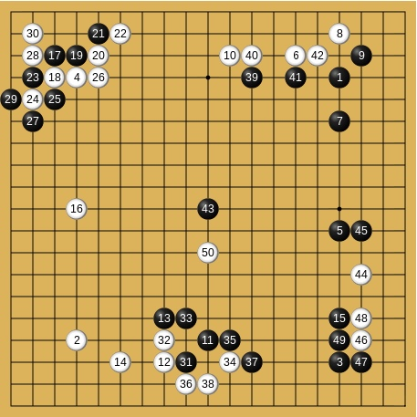 1978年3月1-2日 第2期棋聖戦挑戦手合七番勝負第5局 藤沢秀行棋聖(先番)-加藤劔正本因坊 1-36手目